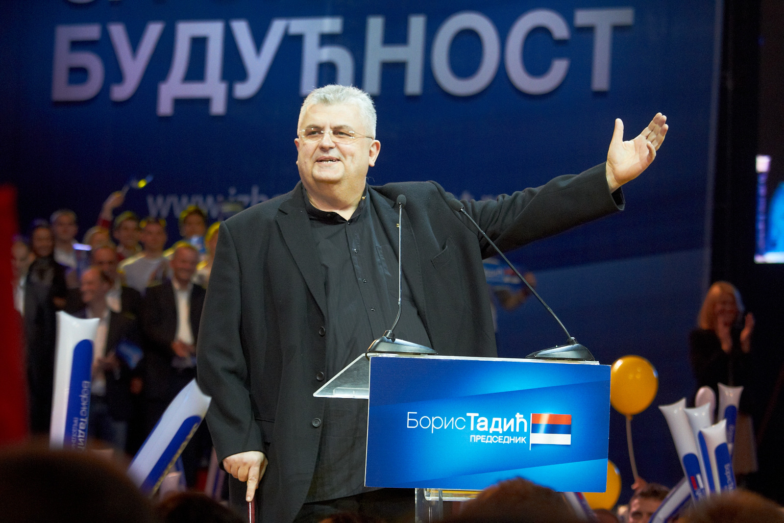 Predsednik LSV-a Nenad Čanak obratio se građanima na završnoj konvenciji u Beogradskoj areni. (17. maj 2012); Foto servis DS